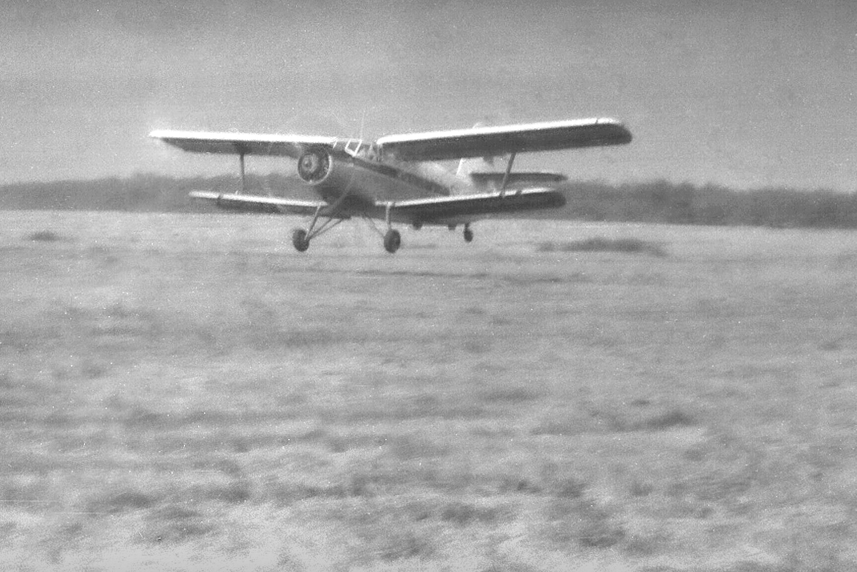 PZL An-2 ( SP-ANK ), 17. 09. 1983 r. uprowadzony z lotniska Aeroklubu Ziemi Lubuskiej w Przylepie ( Zielona Góra ) do Berlina Zachodniego. Pilotowi Janowi Zytce, jego rodzinie i rodzinie Szejnów udało się w ten sposób wyrwać za "żelazną kurtynę". Samolot mimo przechwycenia przez ciężkie śmigłowce szturmowe Armii Radzieckiej, bezpiecznie wylądował na berlińskim lotnisku Tempelhof. ( foto. z 1989 r. )